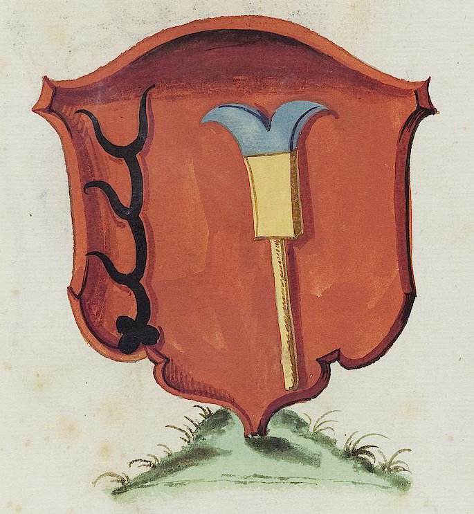 Wappen aus: David Wolleber: Chorographia Württemberg, [Schorndorf] 1591, Universitätsbibliothek Tübingen, Mh 6,1 Wappen Amtsstadt Riexingen (Oberriexingen)